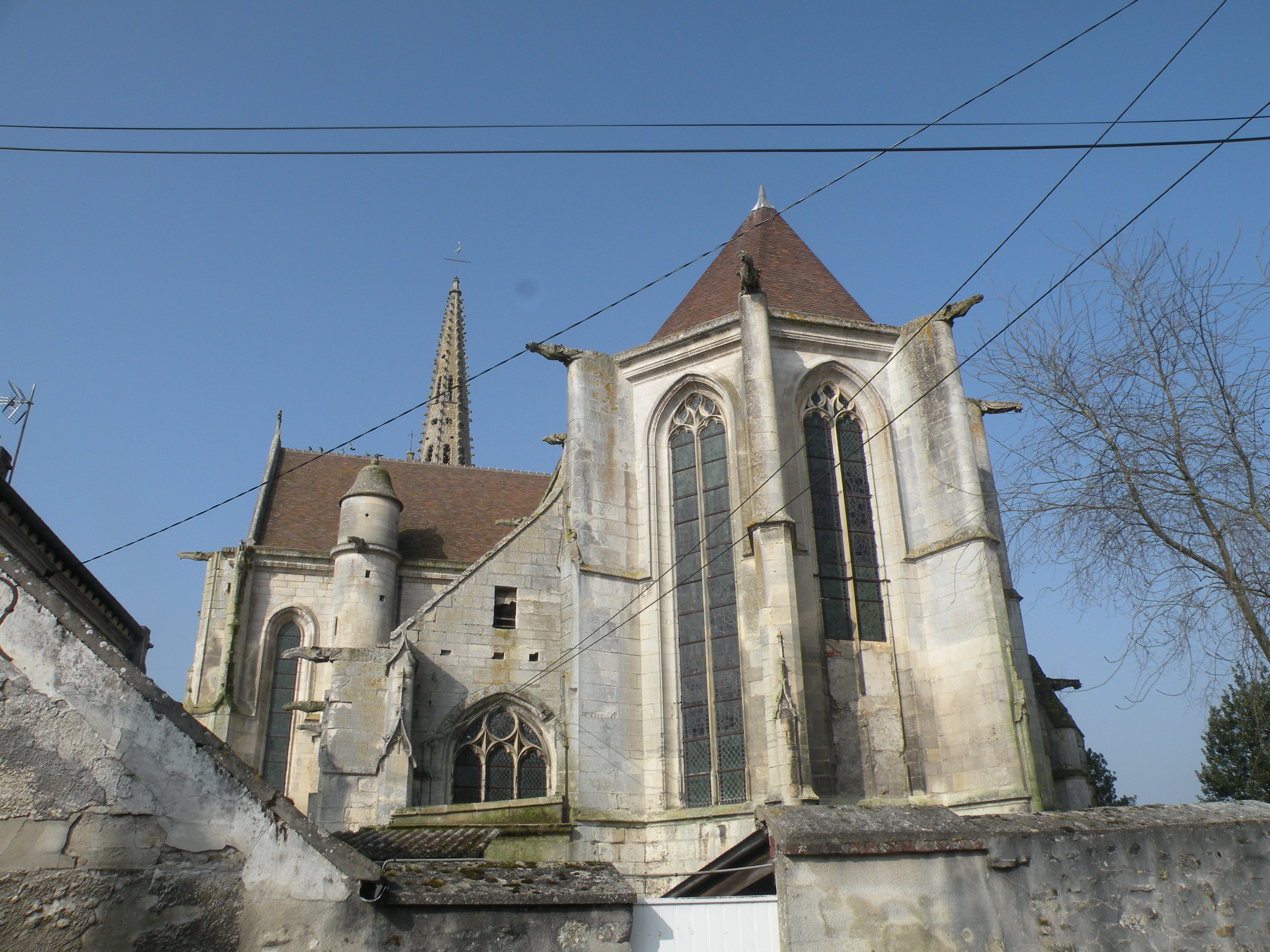 Église Saint-Pierre-et-Saint-Paul de Baron